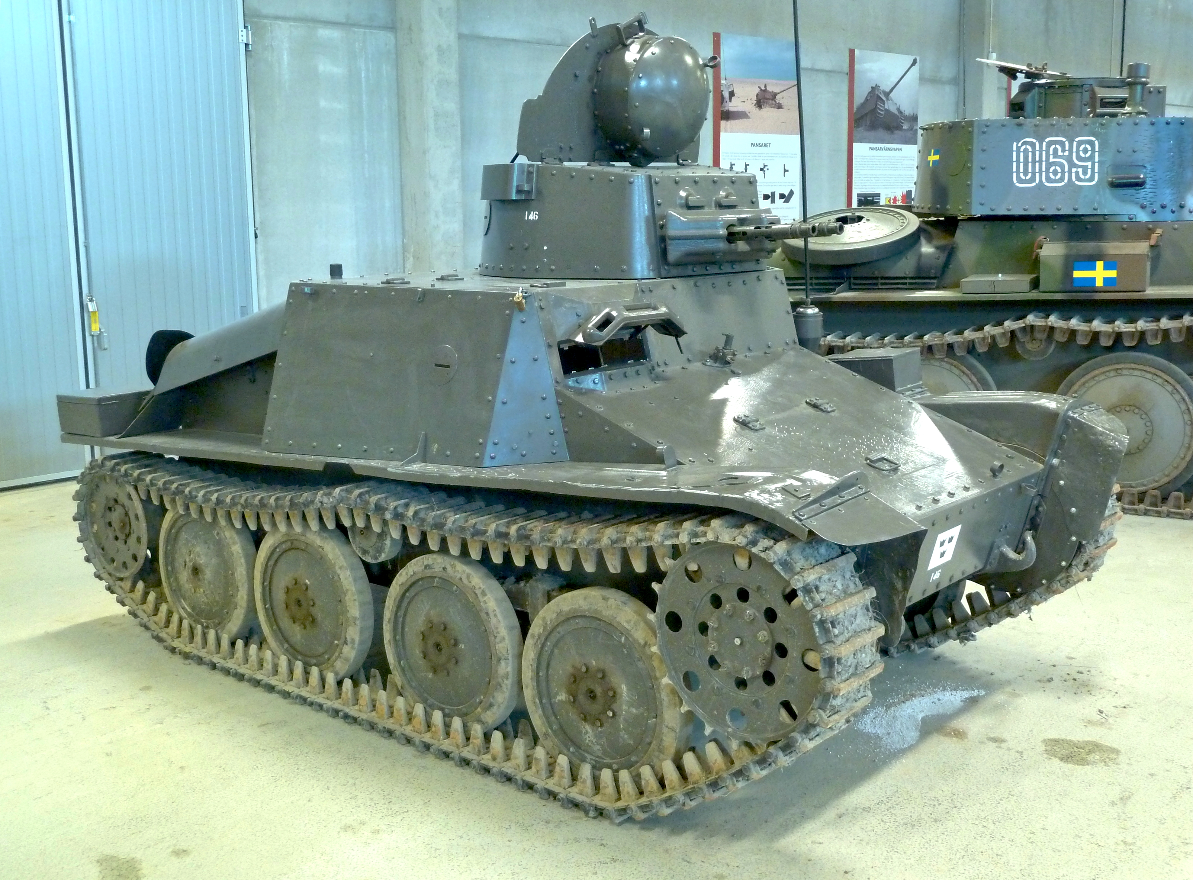 Stridsvagn m/37 i Arsenalen Strängnäs 12.08.2011